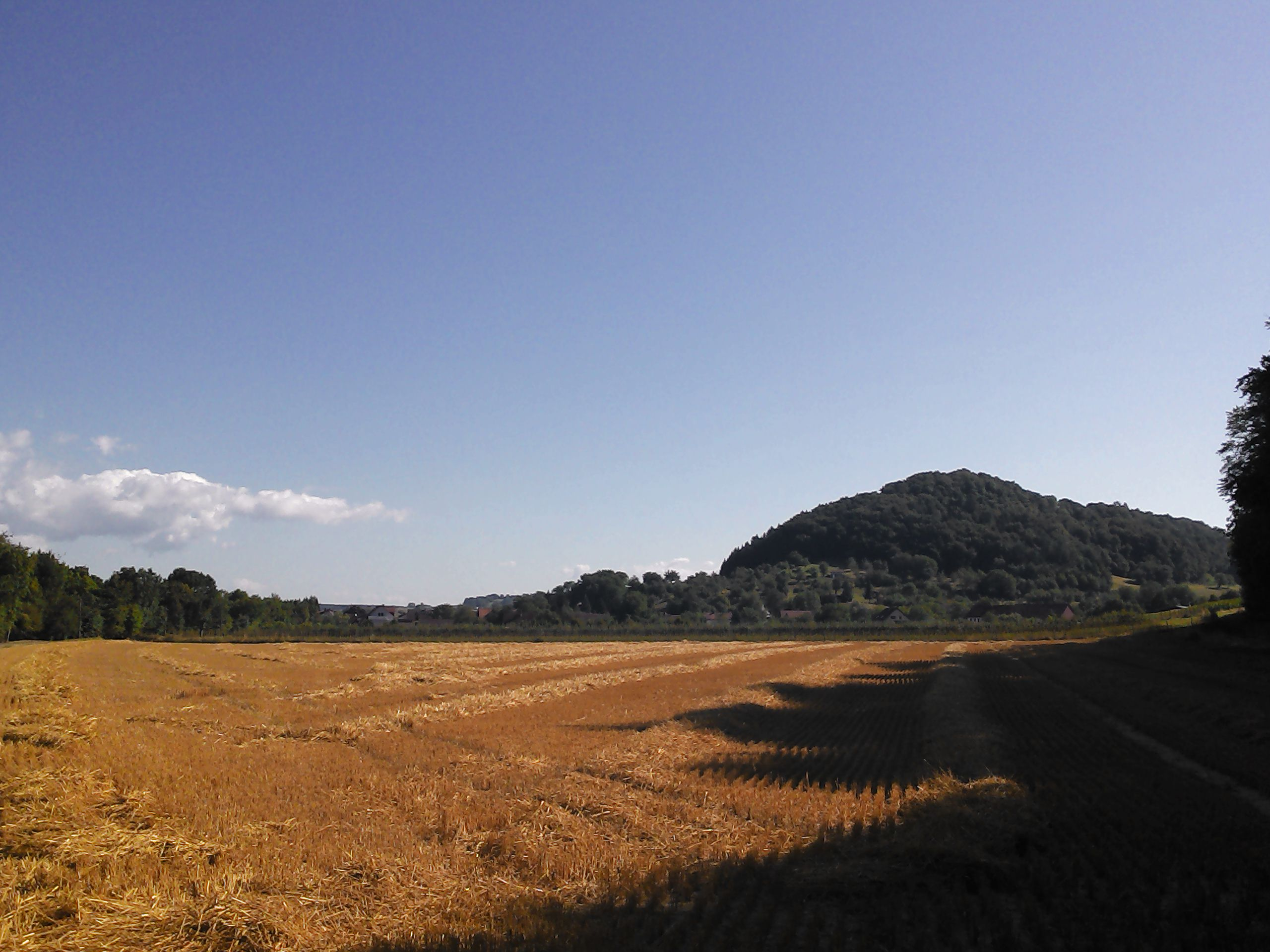 Wutöschingen, Ort Schwerzen, Landkreis Waldshut, Baden-Württemberg. Semberg - Keltische Höhenburg.